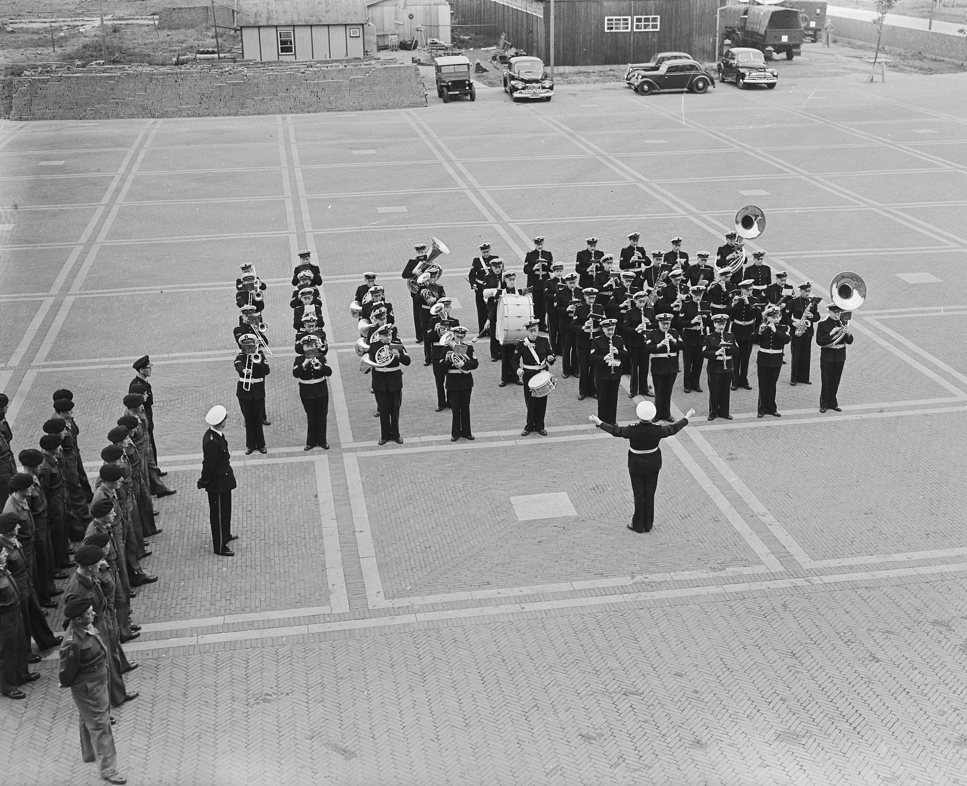 Collectie / Archief : Fotocollectie Anefo Reportage / Serie : [ onbekend ] Beschrijving : Mars gespeeld door Marinierskapel voor Generaal Majoor R.M. de Bruyne. Van Ghentkazerne Rotterdam Datum : 22 juni 1949 Locatie : Noord-Holland, Rotterdam Trefwoorden : marine, mariniers, militarien, officieren Persoonsnaam : Bruyne, M.R. de Fotograaf : Noske, J.D. / Anefo Auteursrechthebbende : Nationaal Archief Materiaalsoort : Glasnegatief Nummer archiefinventaris : bekijk toegang 2.24.01.09 Bestanddeelnummer : 903-4418